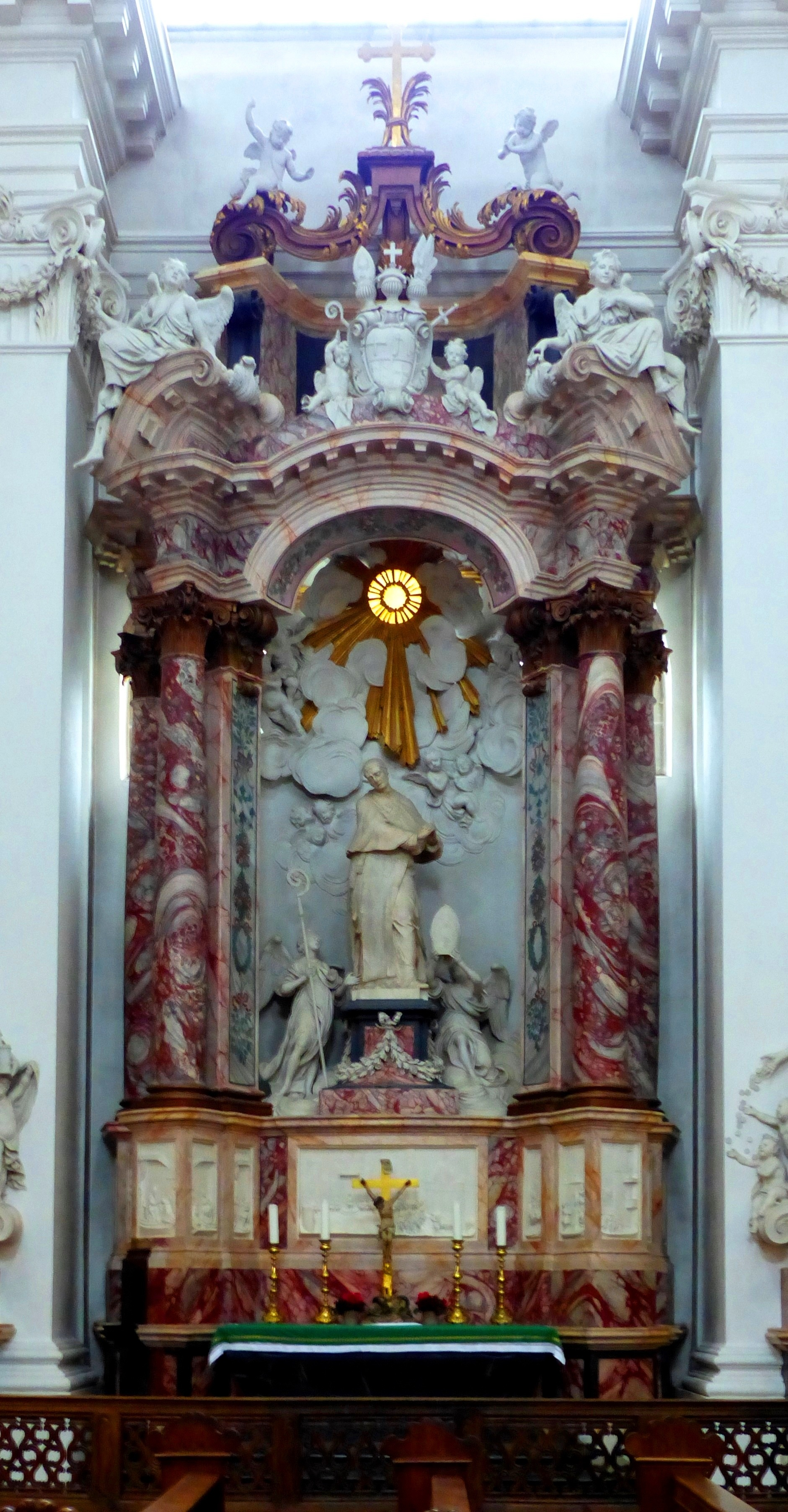 Dom St. Salvator in Fulda, St.-Sturmius-Altar, nördliches Querschiff